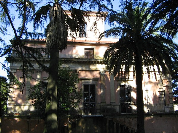 Palazzina liberty all'interno del Parco Comunale di Zafferana Etnea (CT) - Foto D. Pennisi.